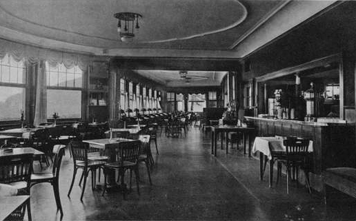 Kümmelbacher Hof, Neckargemünd, Deutschland; Kurhotel Panoramacafé